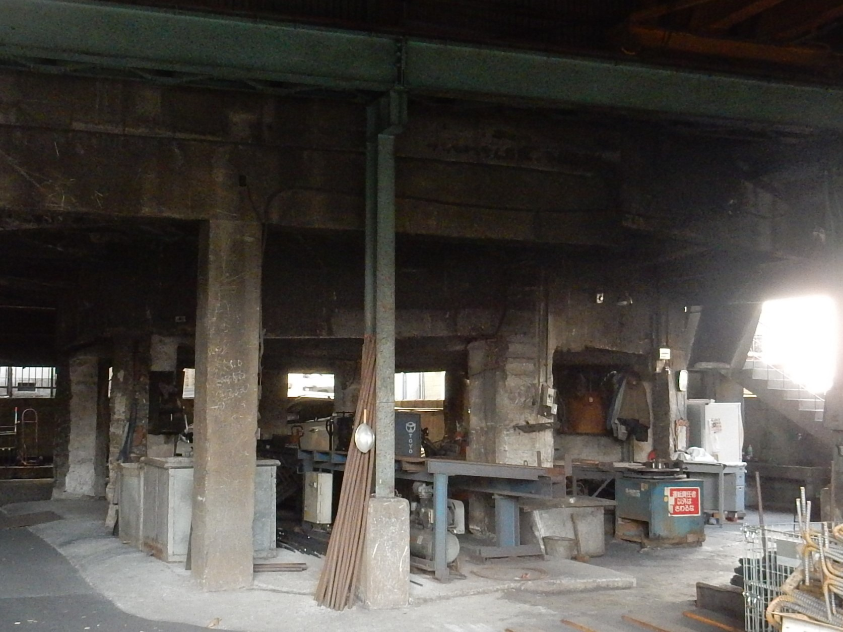 戦前に使われていた高射砲台の跡です。